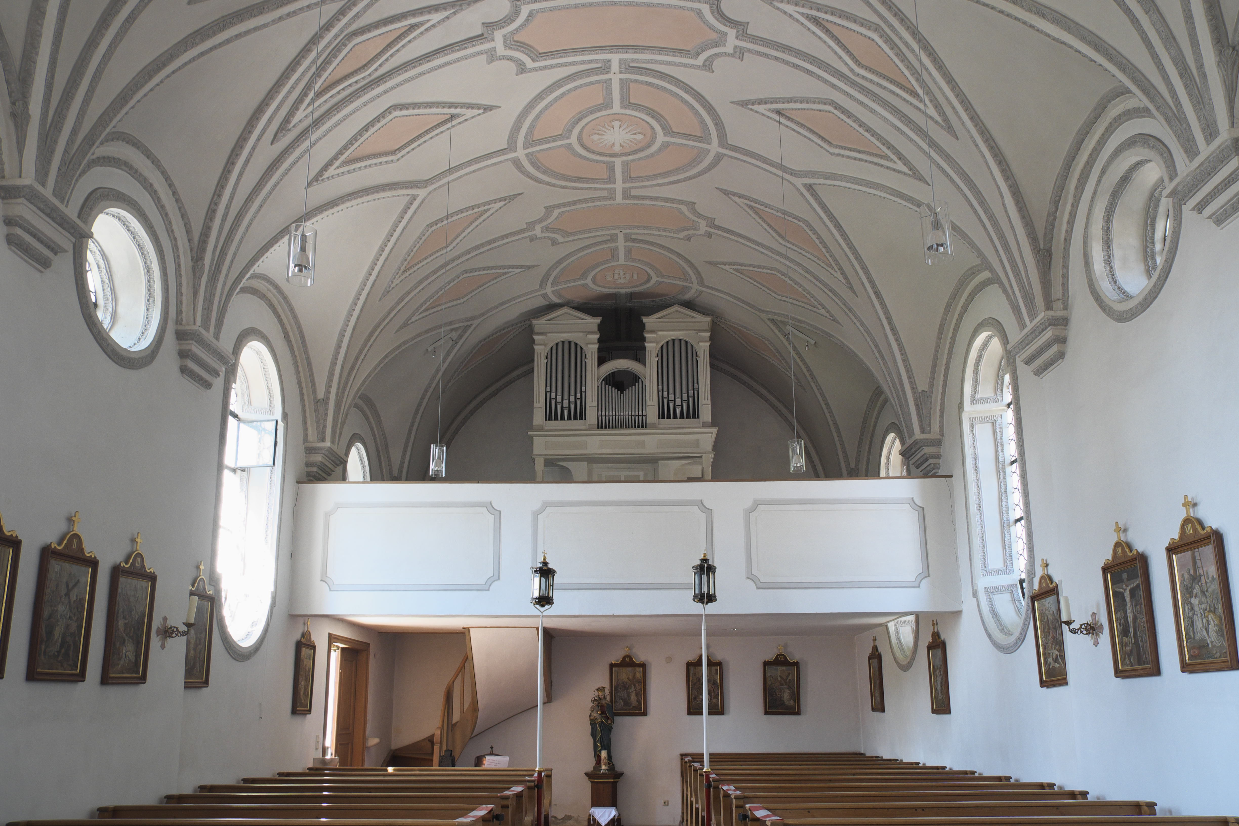 Katholische Pfarrkirche St. Michael in Wenigmünchen (Egenhofen) im oberbayerischen Landkreis Fürstenfeldbruck (Bayern/Deutschland), Innenraum; Blick zur Empore